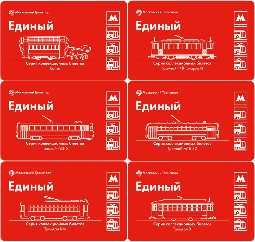 Единый билеты Московского городского транспорта со стилизованными изображениями исторических трамваев Москвы